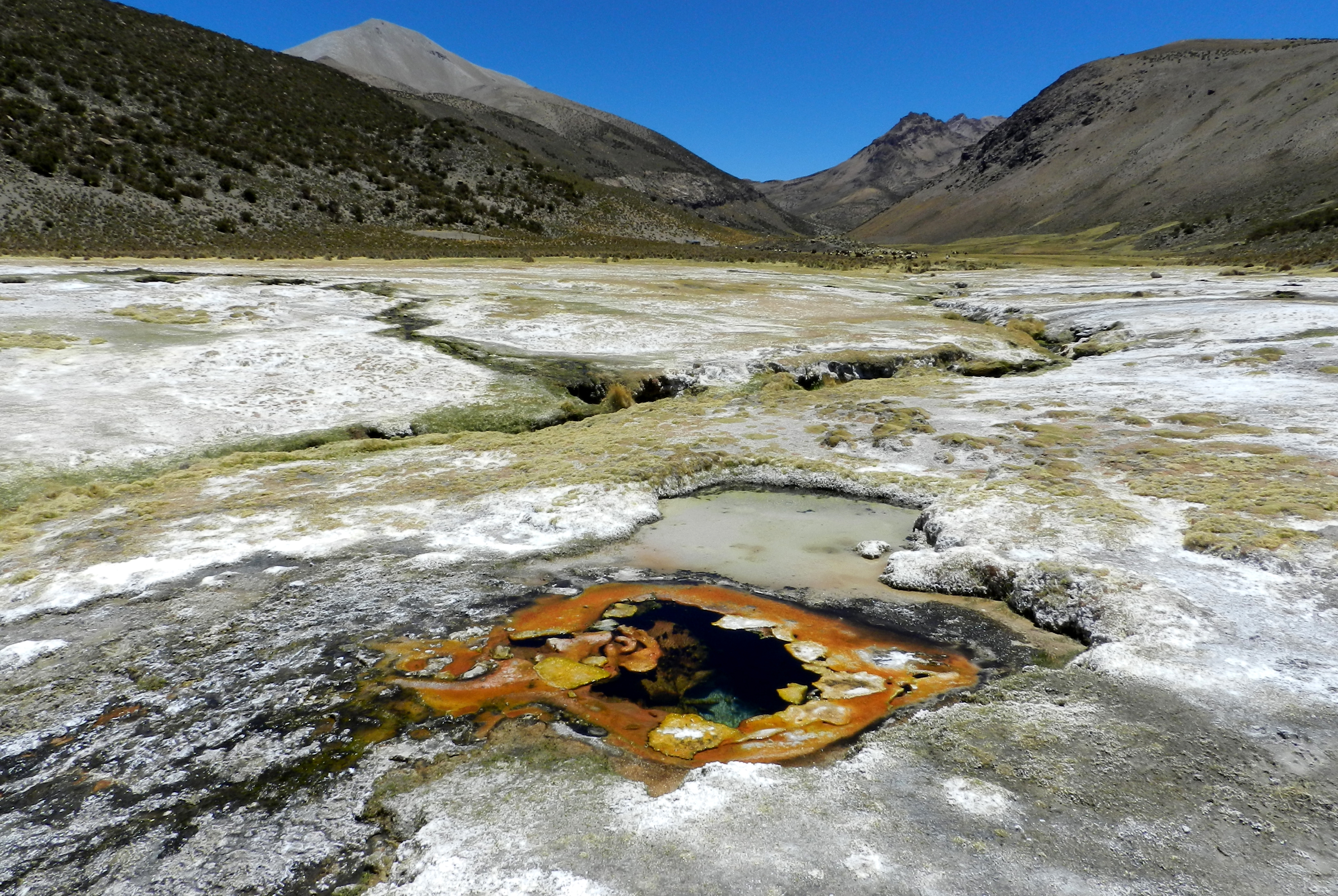 Valle Junthuma (Sajama, Ururo, Bolivia)